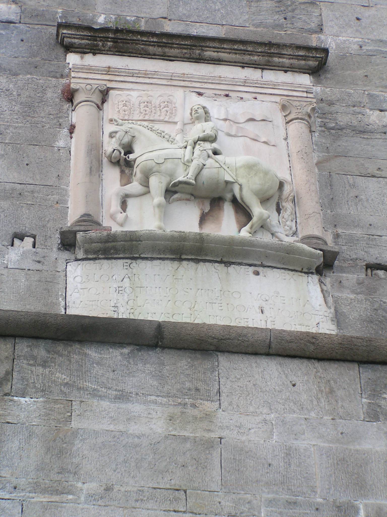 Statua di San Vittore Collegiata di San Vittore